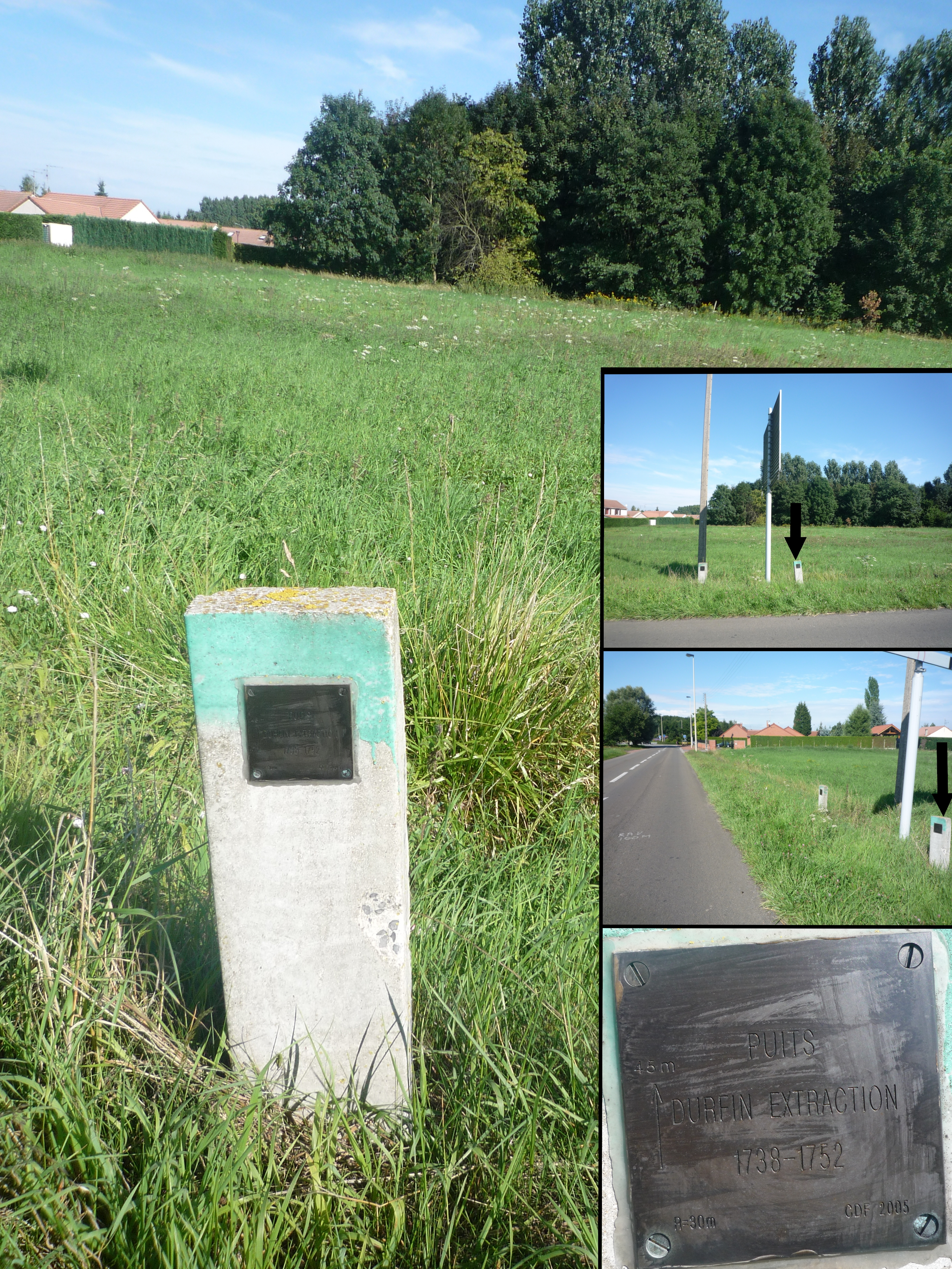 Puits Durfin Extraction de la Compagnie des mines d'Anzin à Fresnes-sur-Escaut, Nord, Nord-Pas-de-Calais, France.